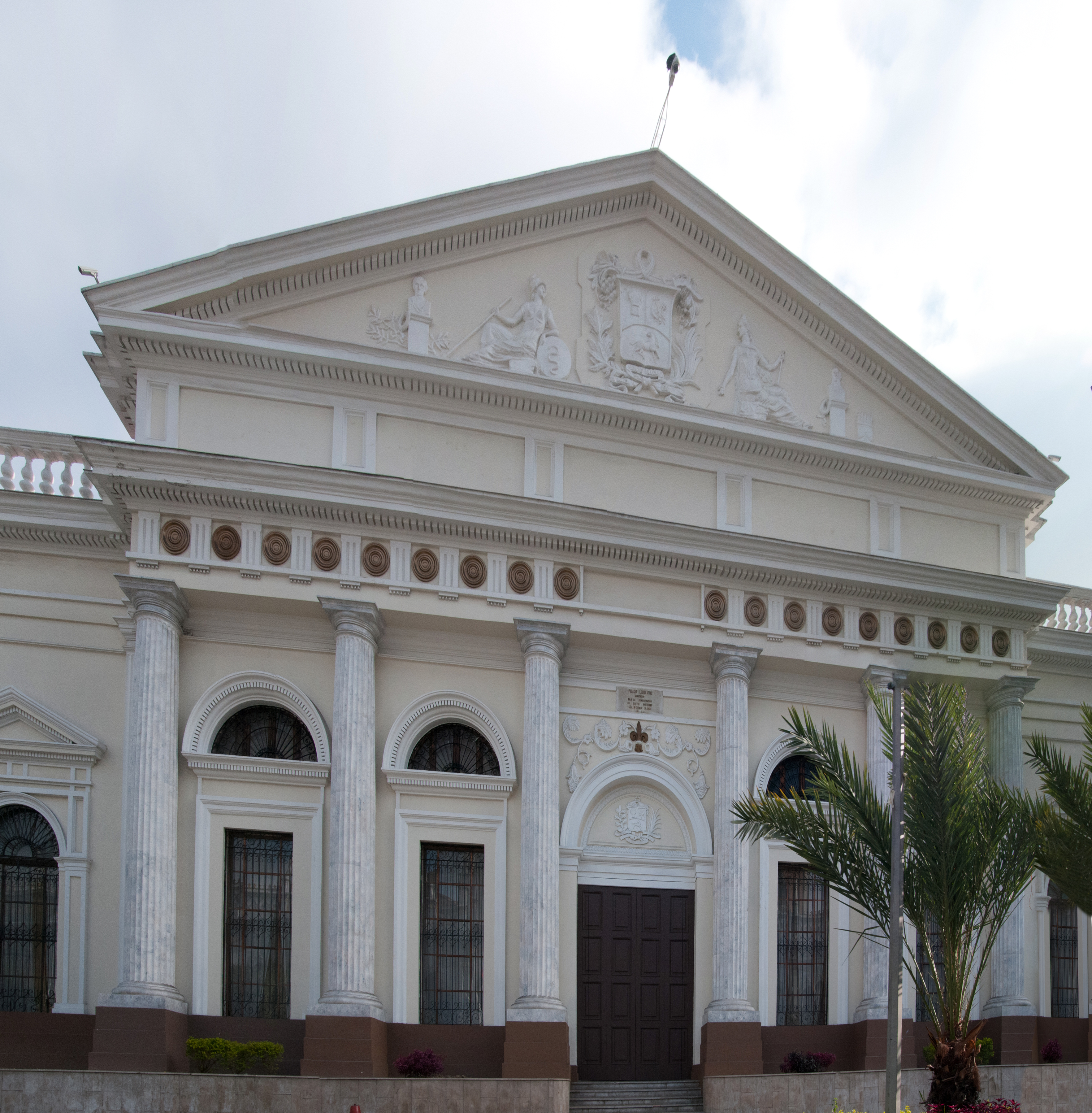 Palacio Legislativo de Caracas